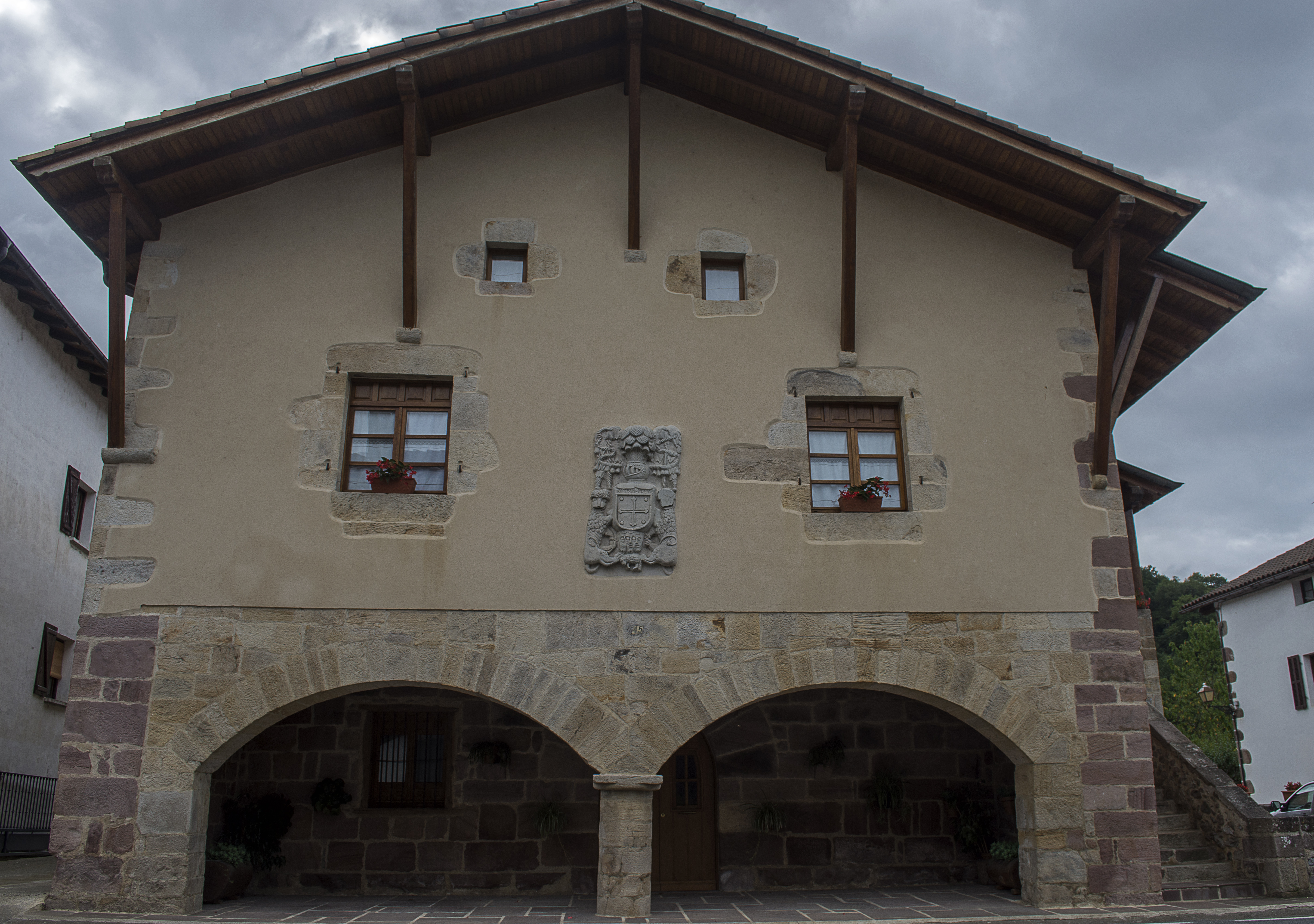 Palacio Arrechea, en Oronoz-Mugaire, Navarra (España)